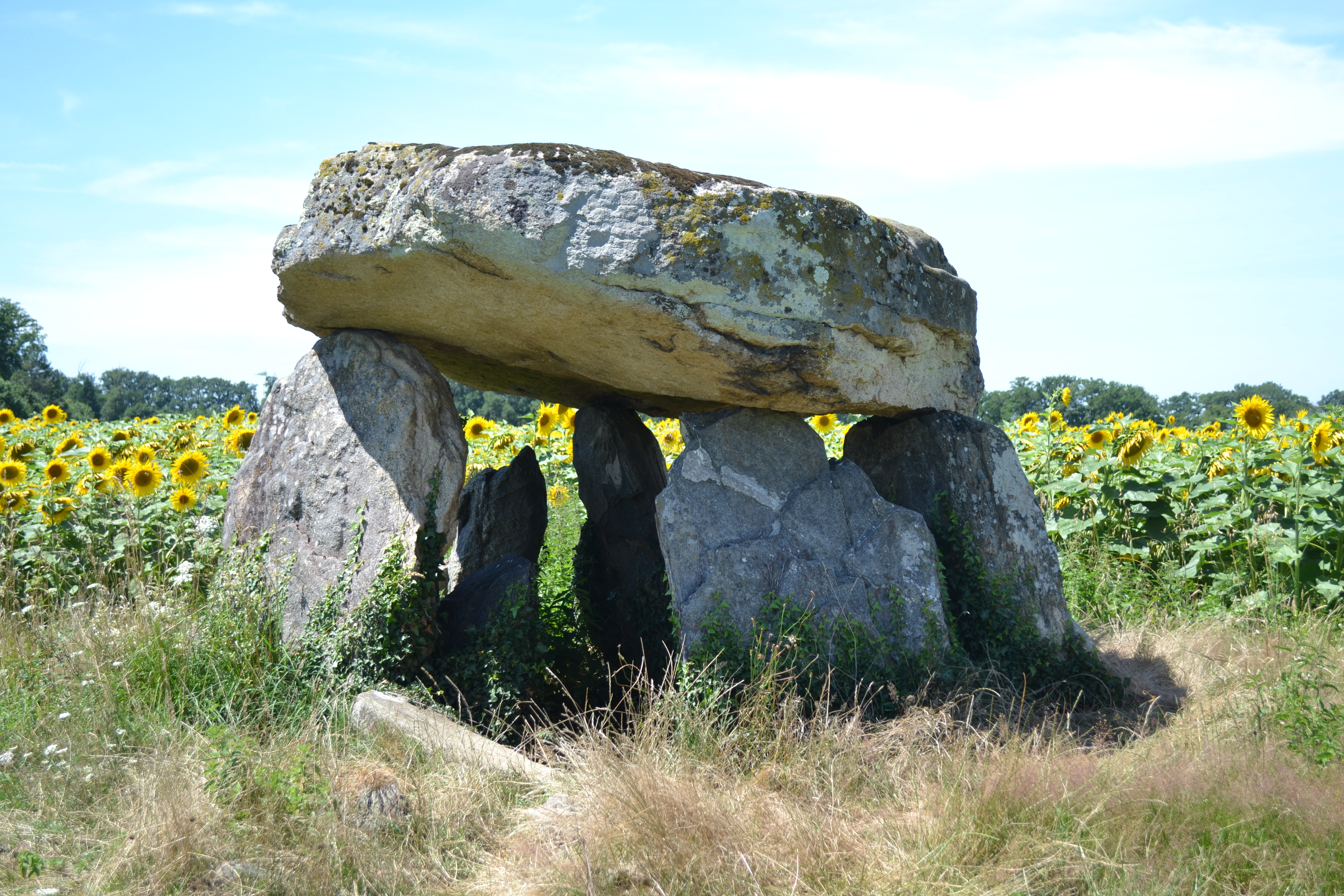 Dolmen de la Bétoulle n°2.